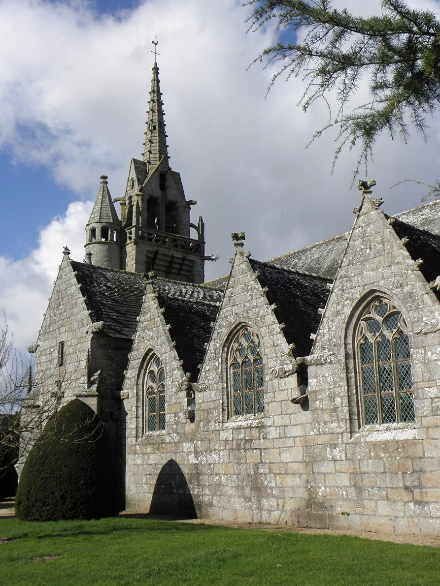 Église Saint-Yves de Plougonven (29).